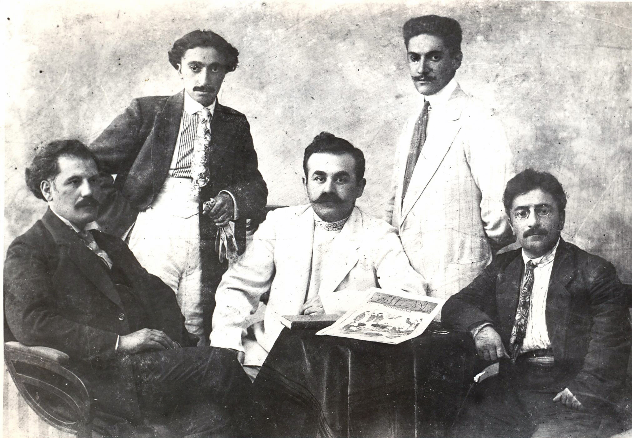 "Molla Nəsrəddin" yazarları. Tiflis. Soldan: Əbdürrəhim bəy Haqverdiyev, Rzaqulu Nəcəfov, Salman Mümtaz, Zeynal Məmmədli, Əliqulu Qəmküsar.